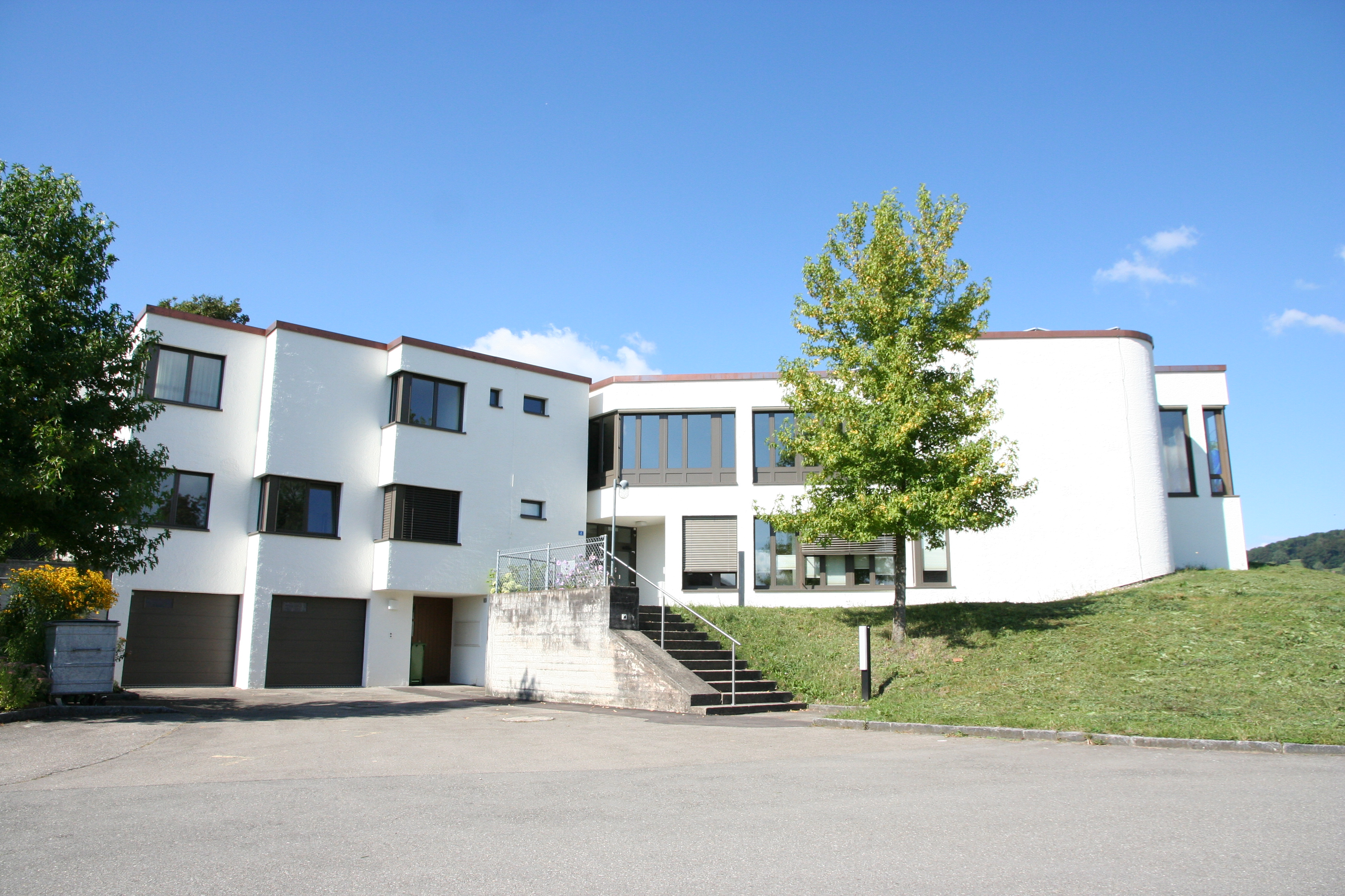 röm.-kath. Kirche St. Burkard Mettmenstetten, Ansicht von Süden